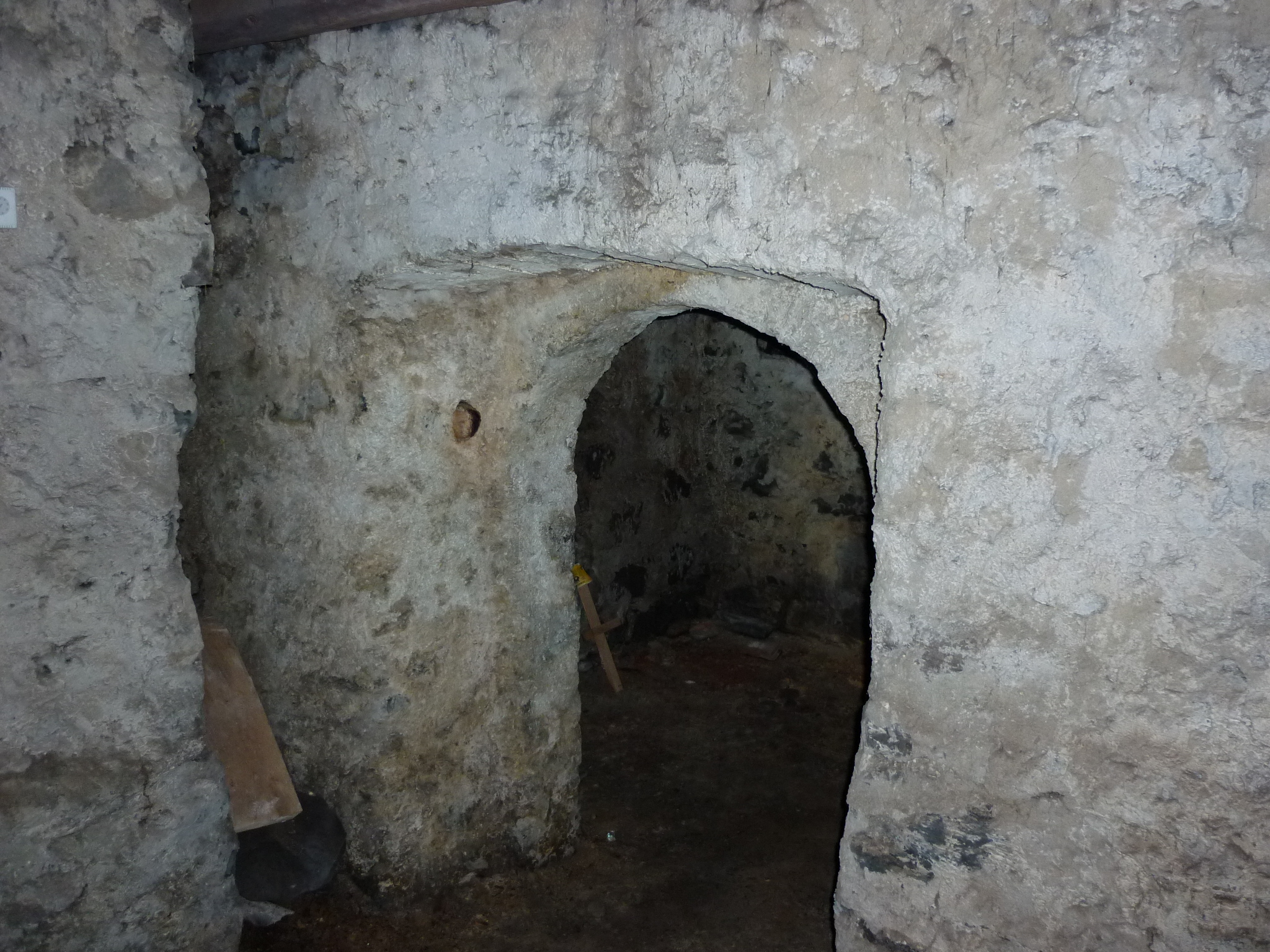 Haus Plazetta 73, Ardez GR, Schweiz